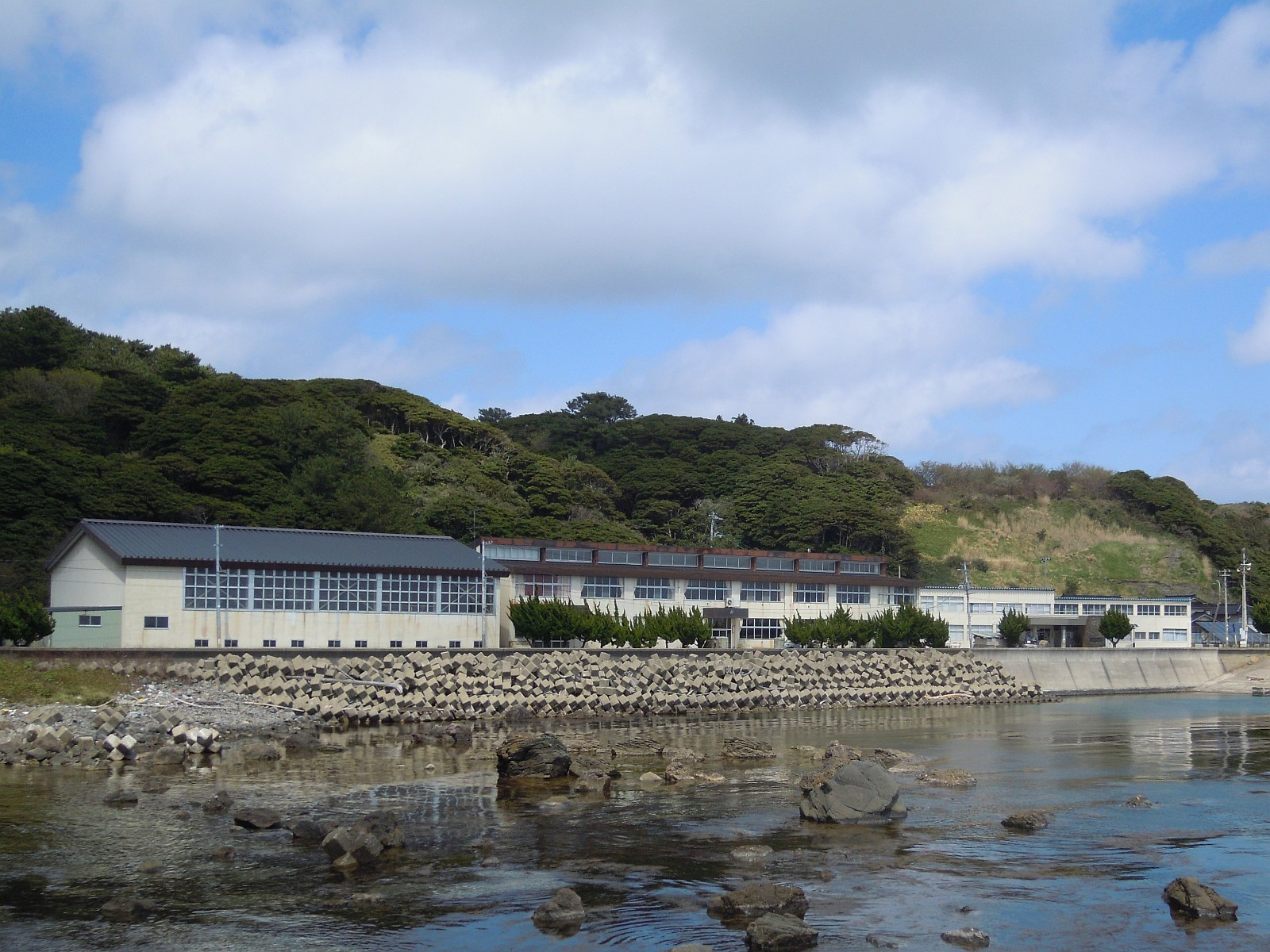 山形県酒田市の飛島にある酒田市立飛島小学校および酒田市立飛島中学校の校舎。右側にあるのは酒田市のとびしま総合センター庁舎